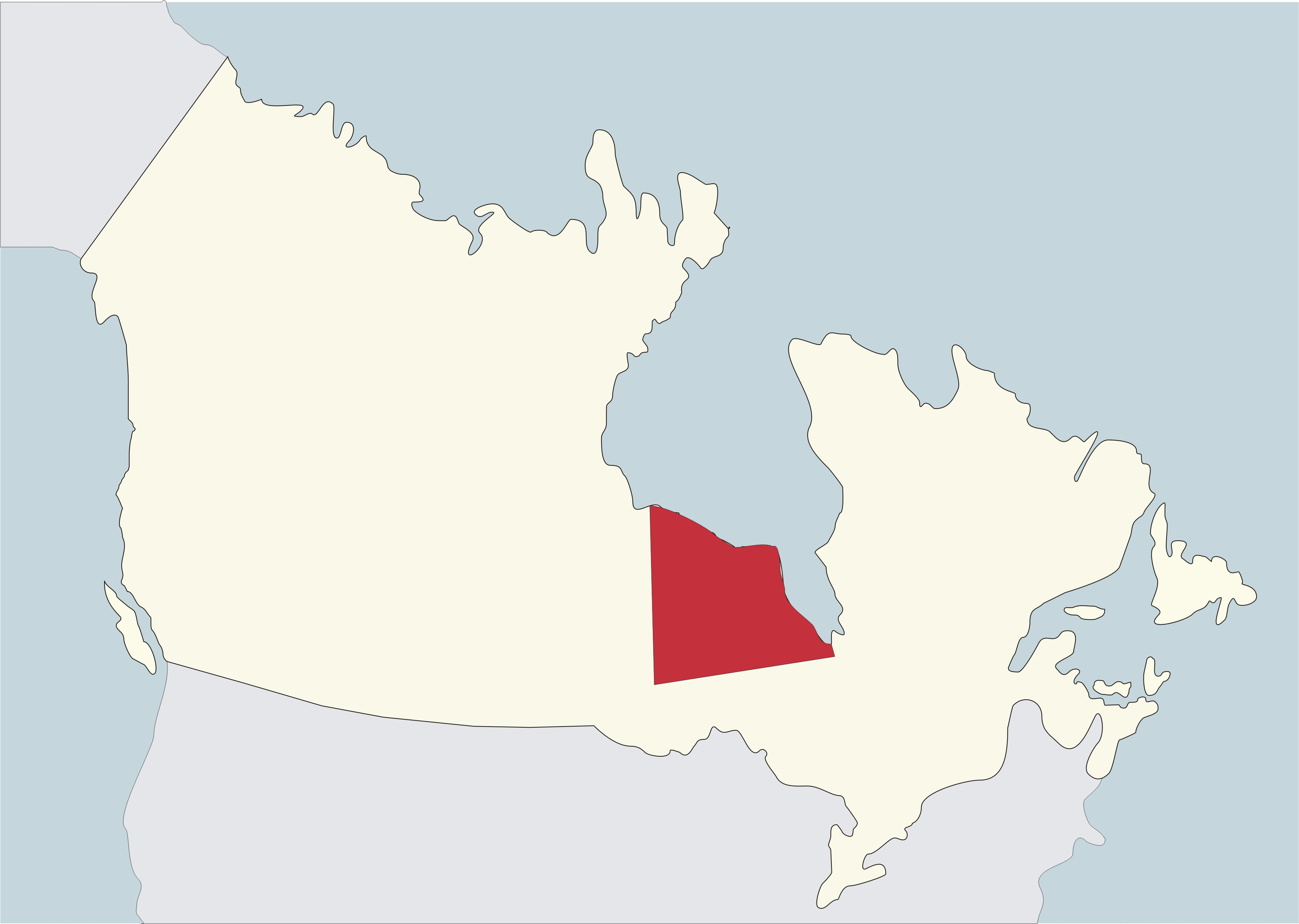 Mapa del bisbat de Baie-Comeau a Canadà